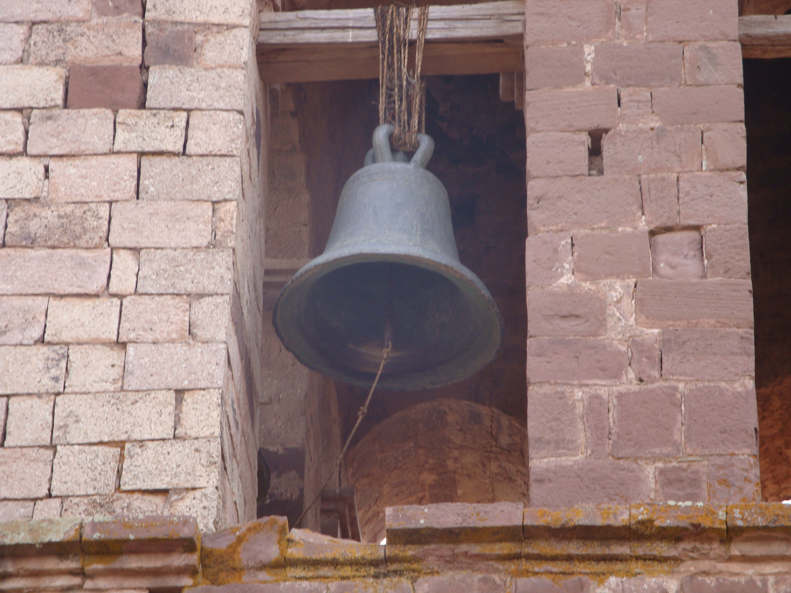 campanario del templo de Caquingora This medium shows the protected monument with the number L/00-310 in Bolivia.